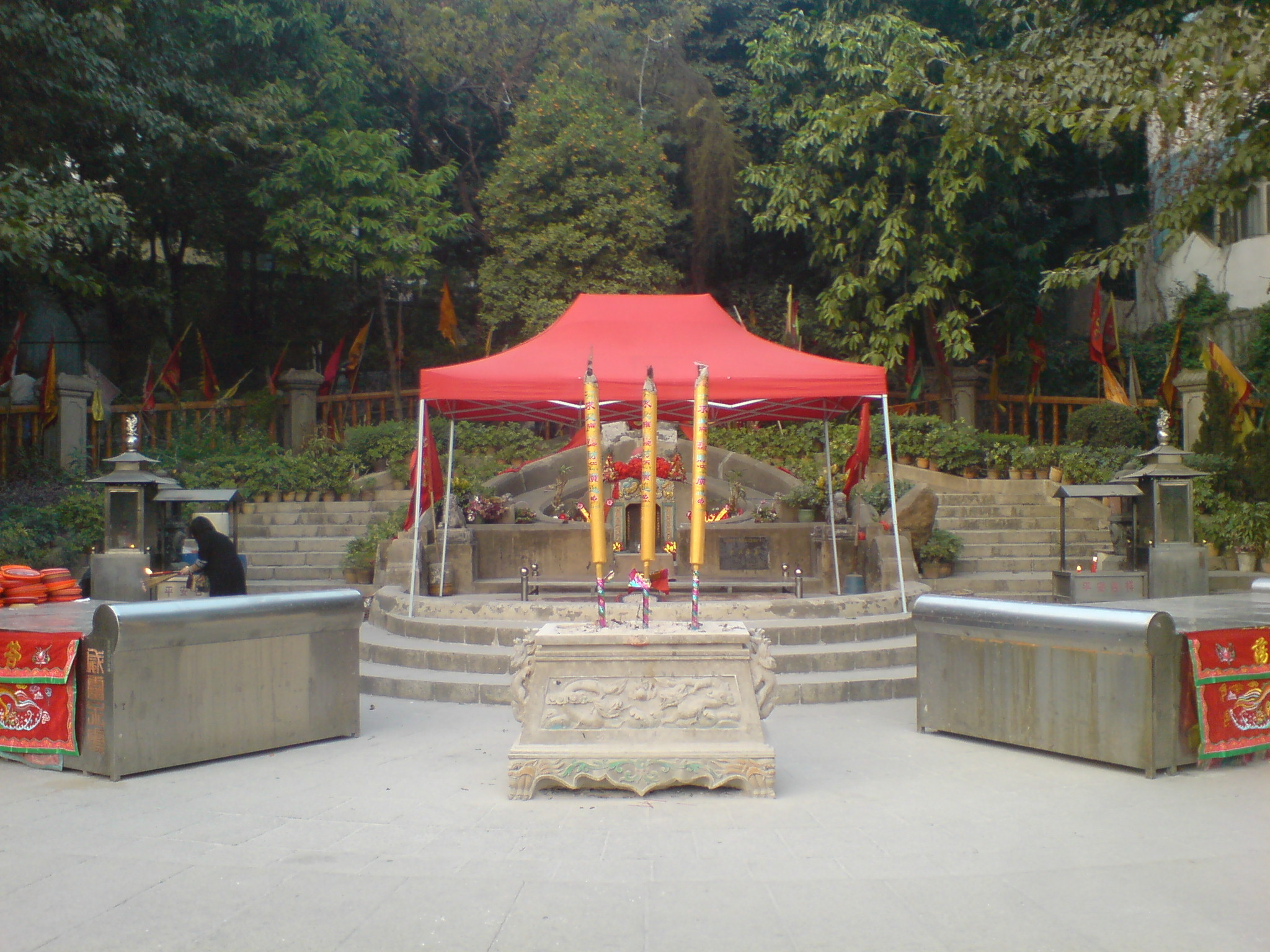 深圳南山區宋少帝陵